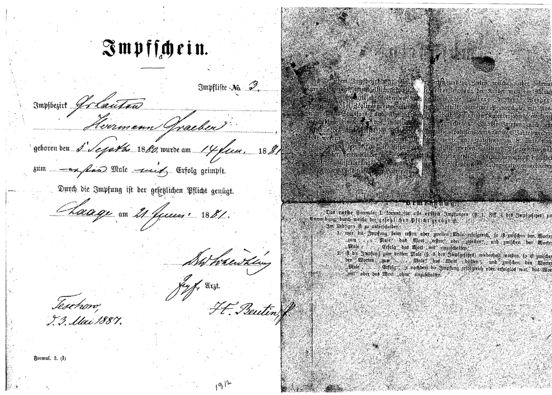 Impfschein des Hermann (Carl Ludwig) Gräber vom 14. Juni 1881, ausgestellt am 21. Juni 1881. Hermann Gräber wurde am 06. September 1880 geboren. Die Impfung wurde am 03. Mai 1887 wiederholt.